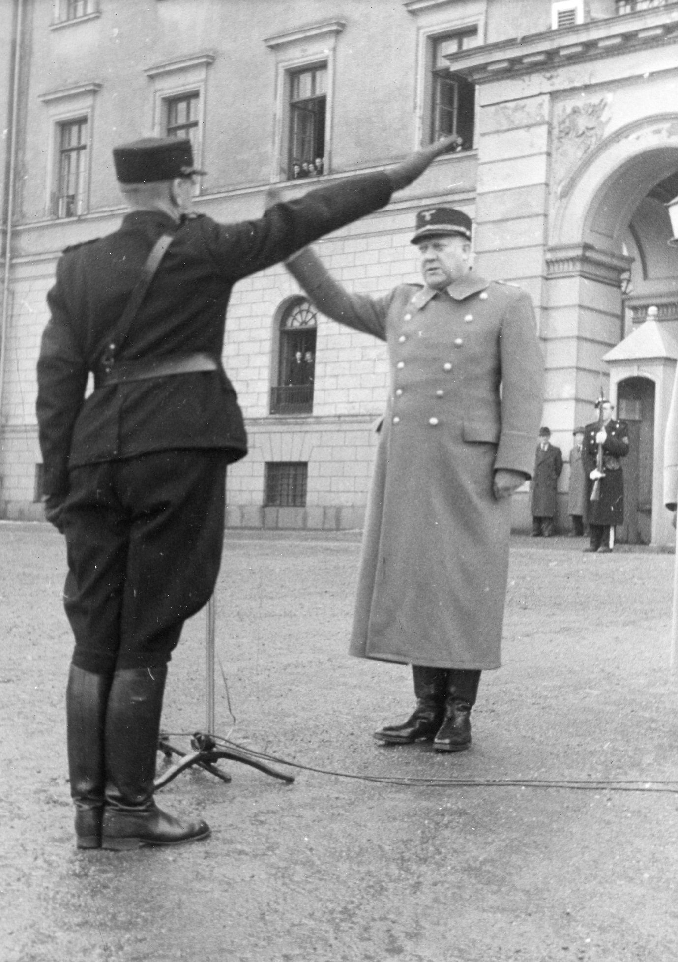 RA/PA-1209/Ue 96/ img088 Nasjonal Samling, forkortet NS, var et norsk politisk parti som ble grunnlagt av Vidkun Quisling i 1933 og ble oppløst ved frigjøringa i 1945. Ideologisk fulgte partiet den tyske nasjonalsosialismen, og NS ble støtteorganisasjon for den tyske okkupasjonsmakta i Norge under andre verdenskrig.